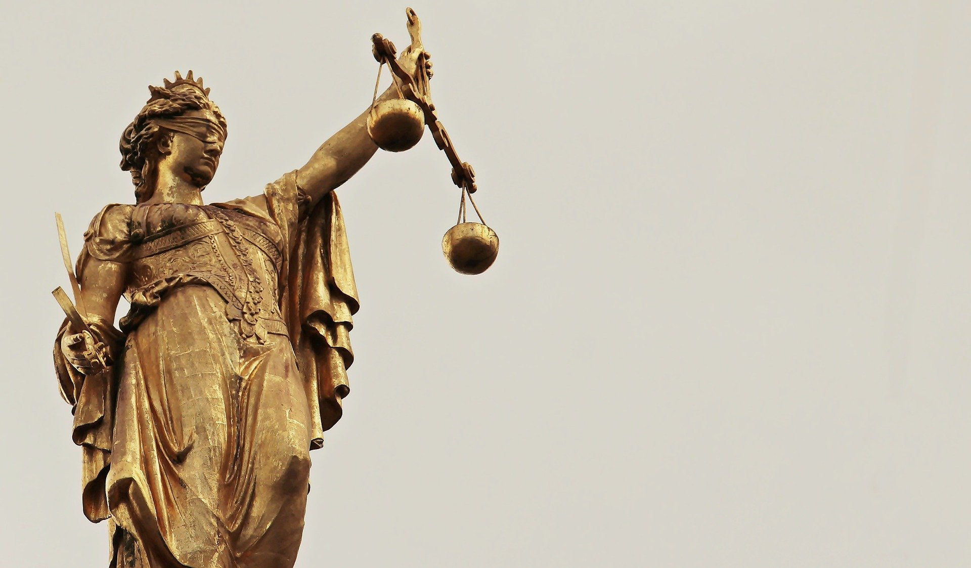 Themis